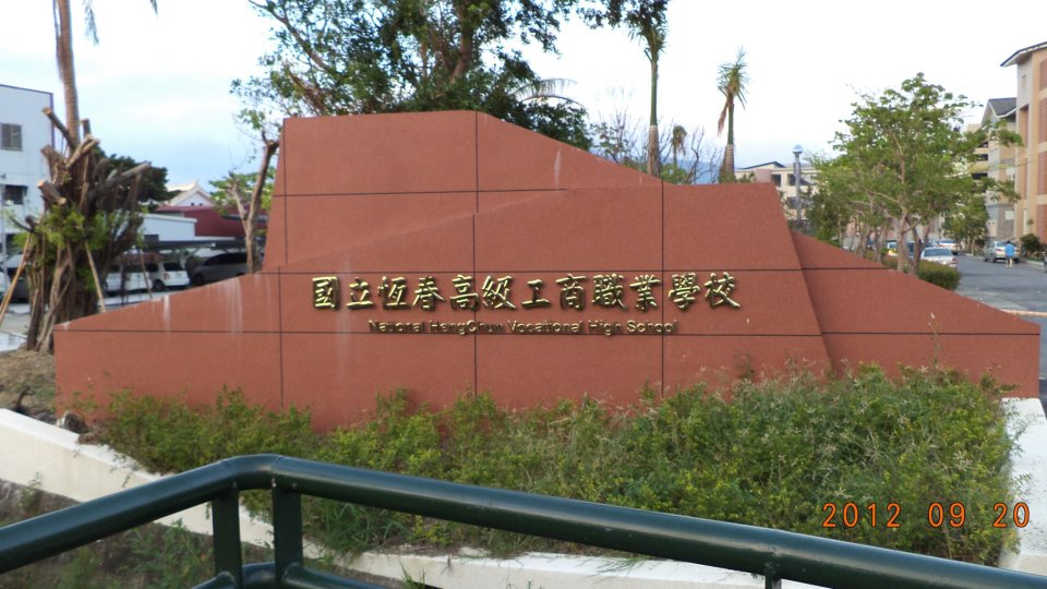 國立恆春高級工商職業學校校門校名機關題字